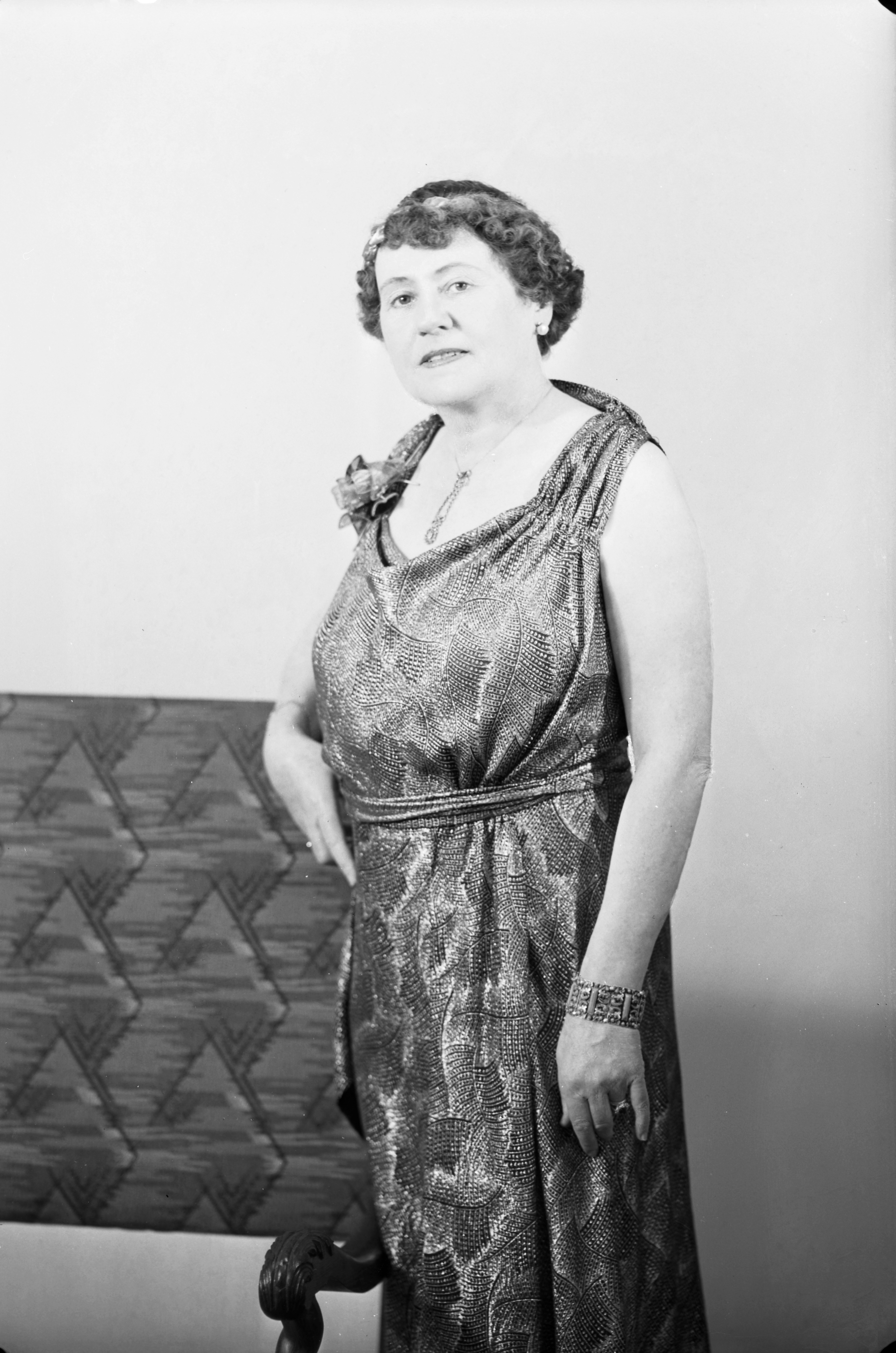 kenraalitar Aino Ackté-Jalander; pysty, mustavalkoinen